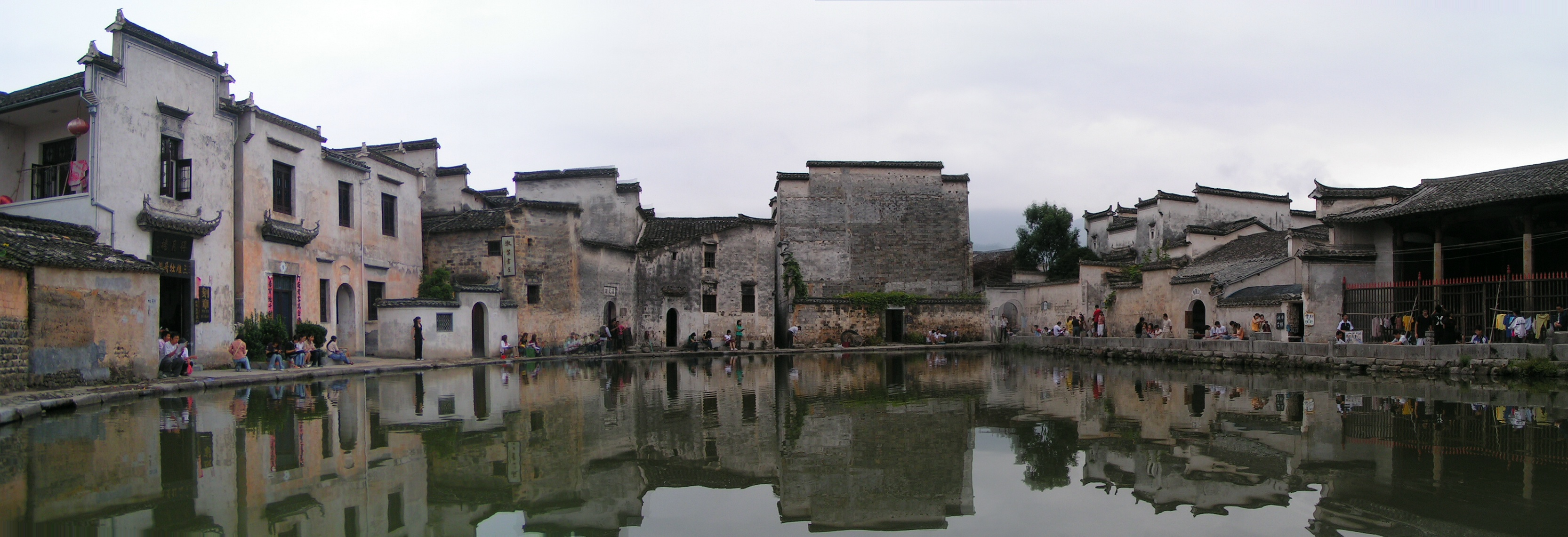 联合国世界文化遗产————宏村